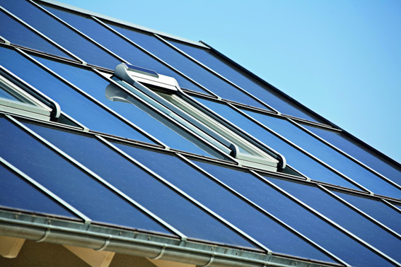 Produkt der Roto Frank AG